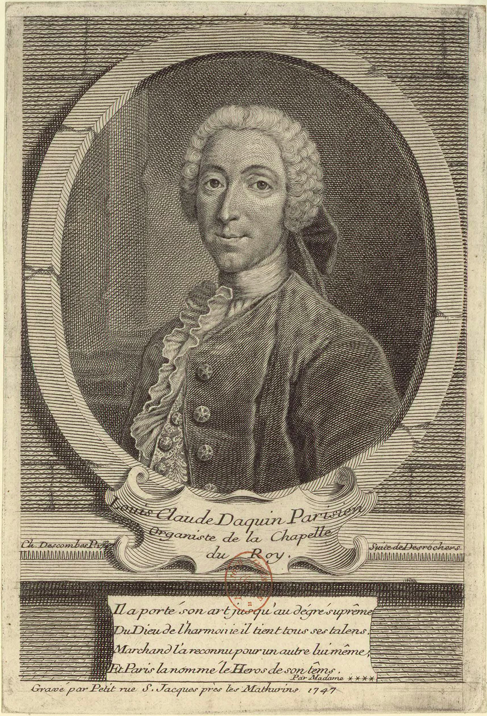 Depicted person: Louis-Claude Daquin